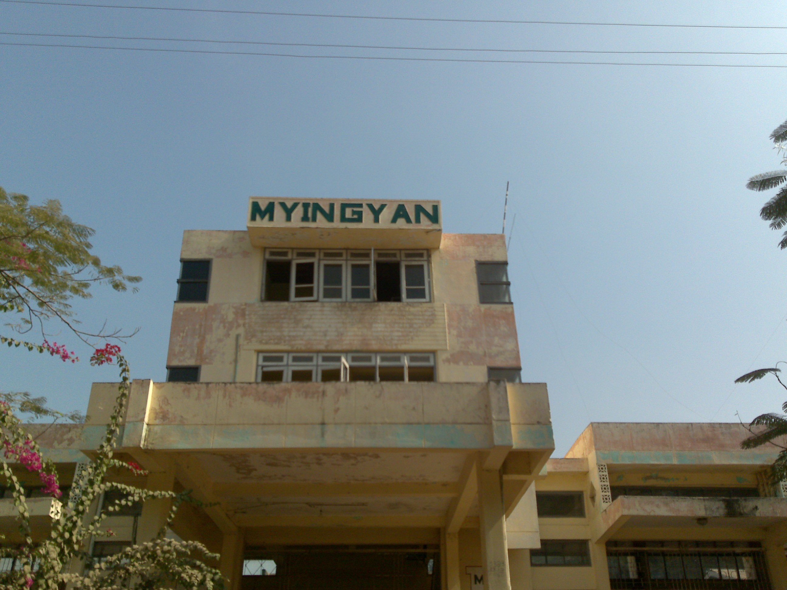 myingyan railway station